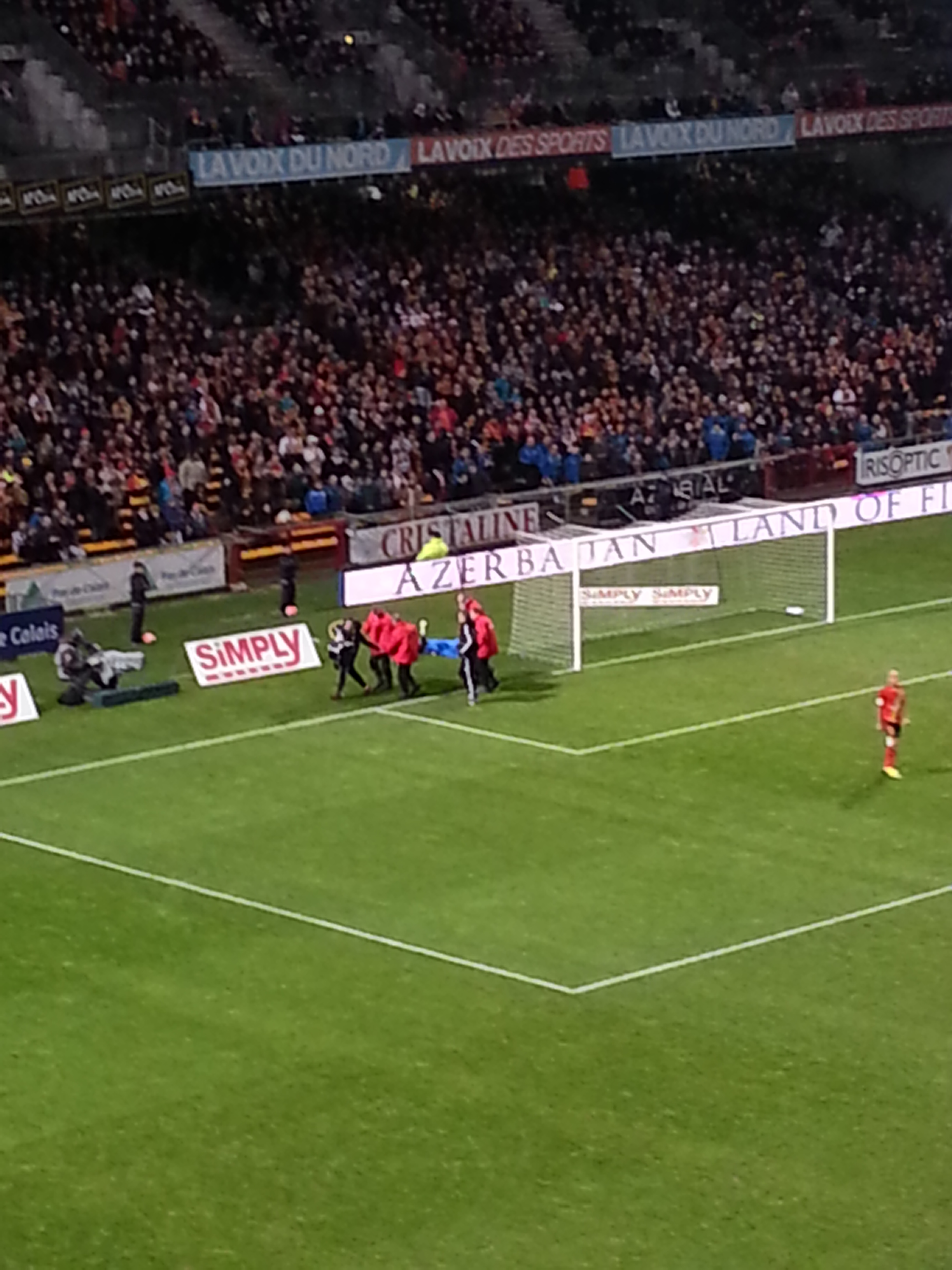 Sortie sur civière d'Alphonse Areola, gardien du Racing Club de Lens, applaudissant ses supporters qui scandent son nom.